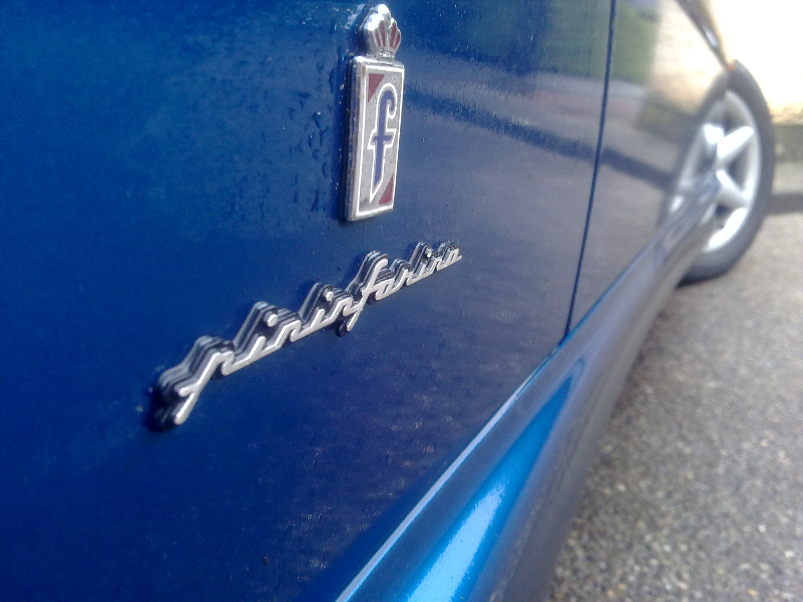 Carrosserie signée Pininfarina d'un Peugeot 406 Coupé bleu byzance.